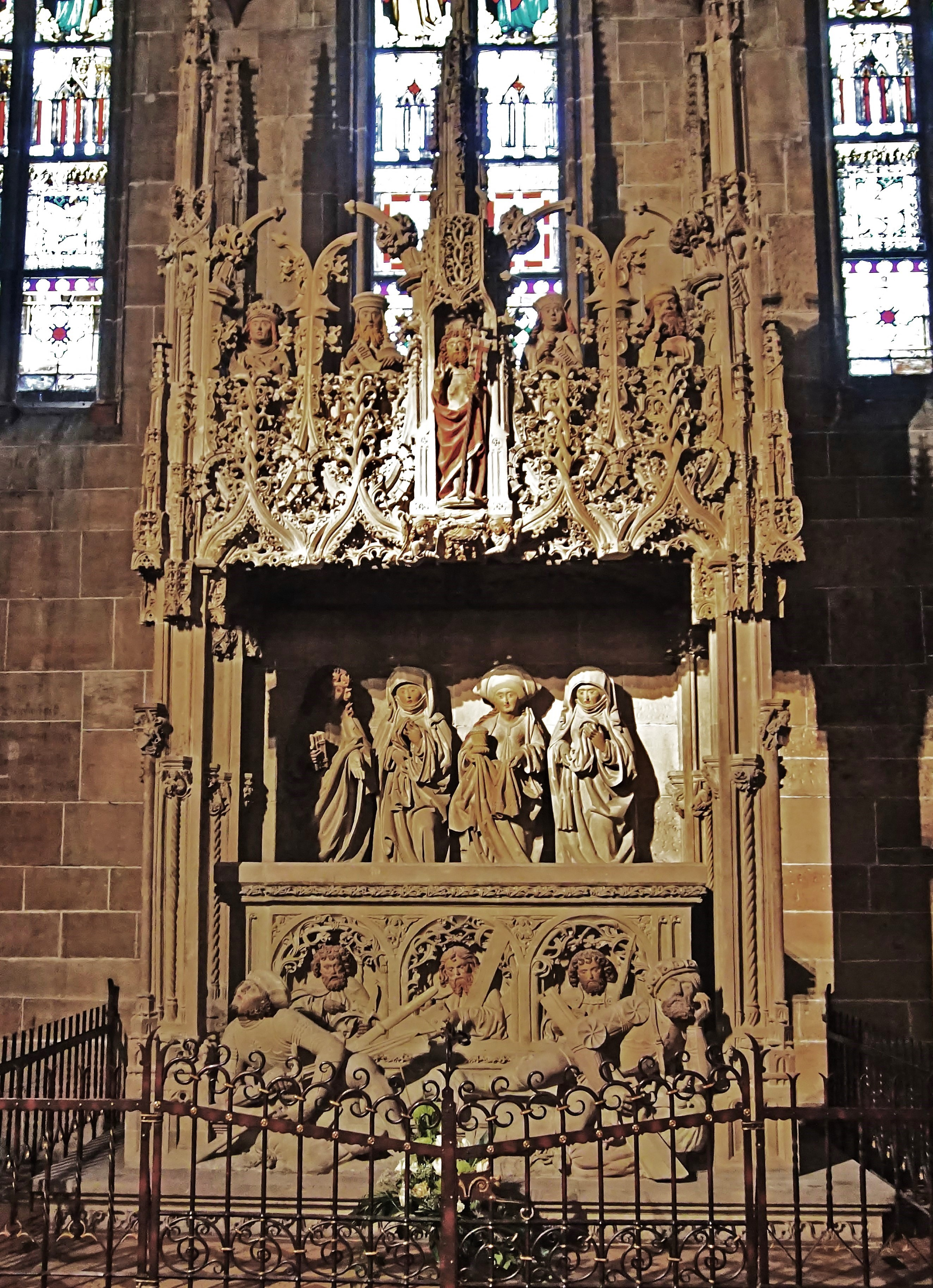 Das Hl. Grab in der Marienkirche (Reutlingen)